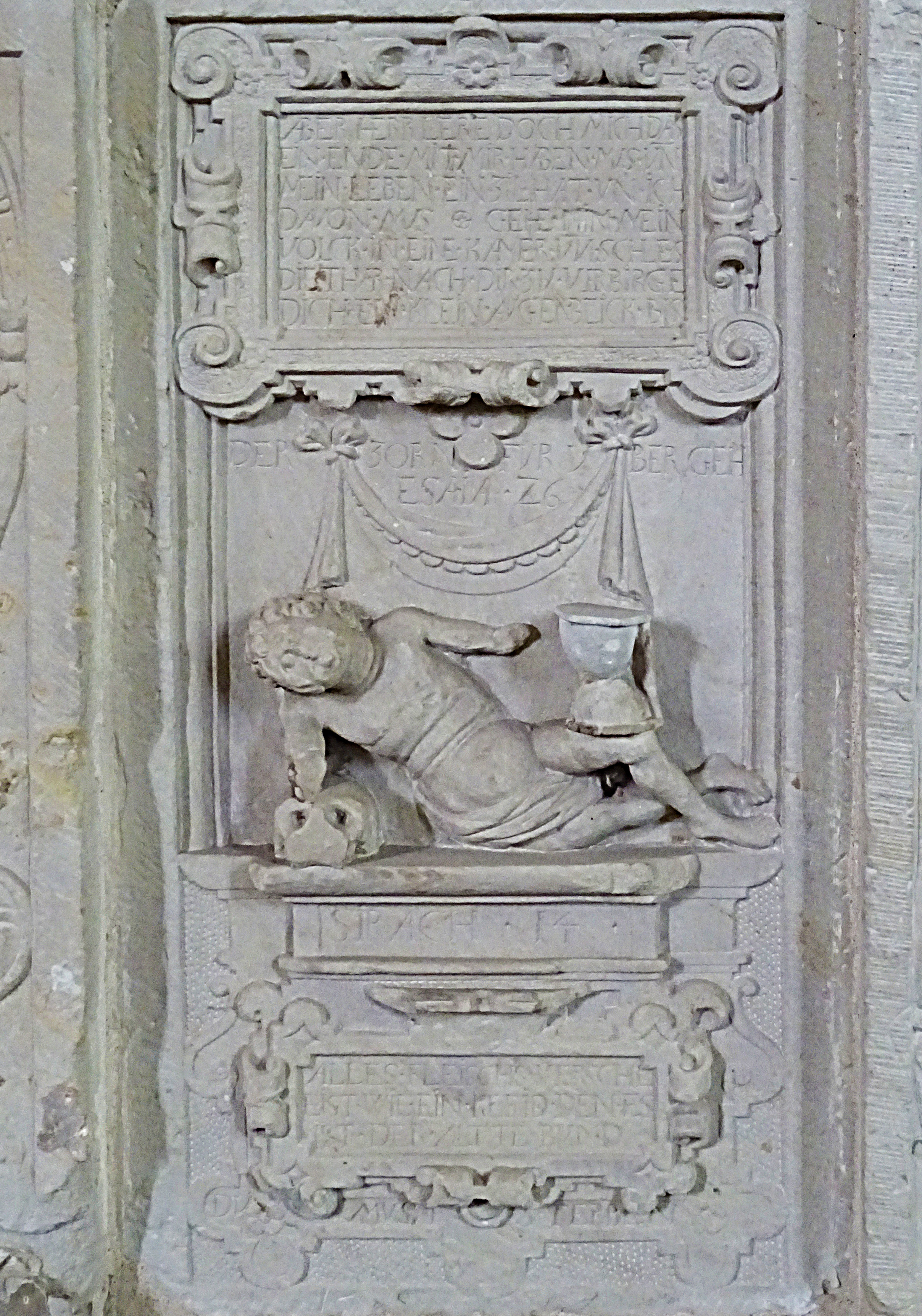 Steinbilderbibel in der St. Annenkirche (Eisleben), 01/29, Tod des Menschen